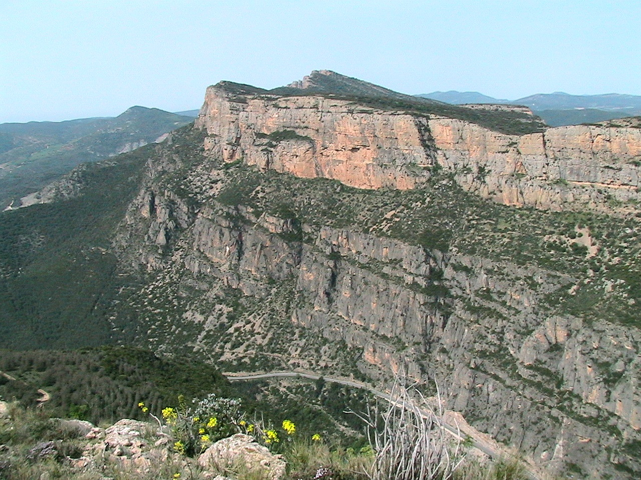 Vista lateral del Mont-roig des del Tossal de Sant Jordi , a Camarasa (Noguera - Catalunya)